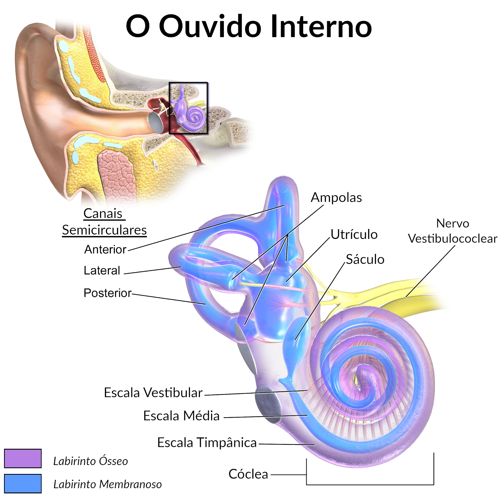 Anatomia da orelha, com destaque para as estruturas do ouvido interno.